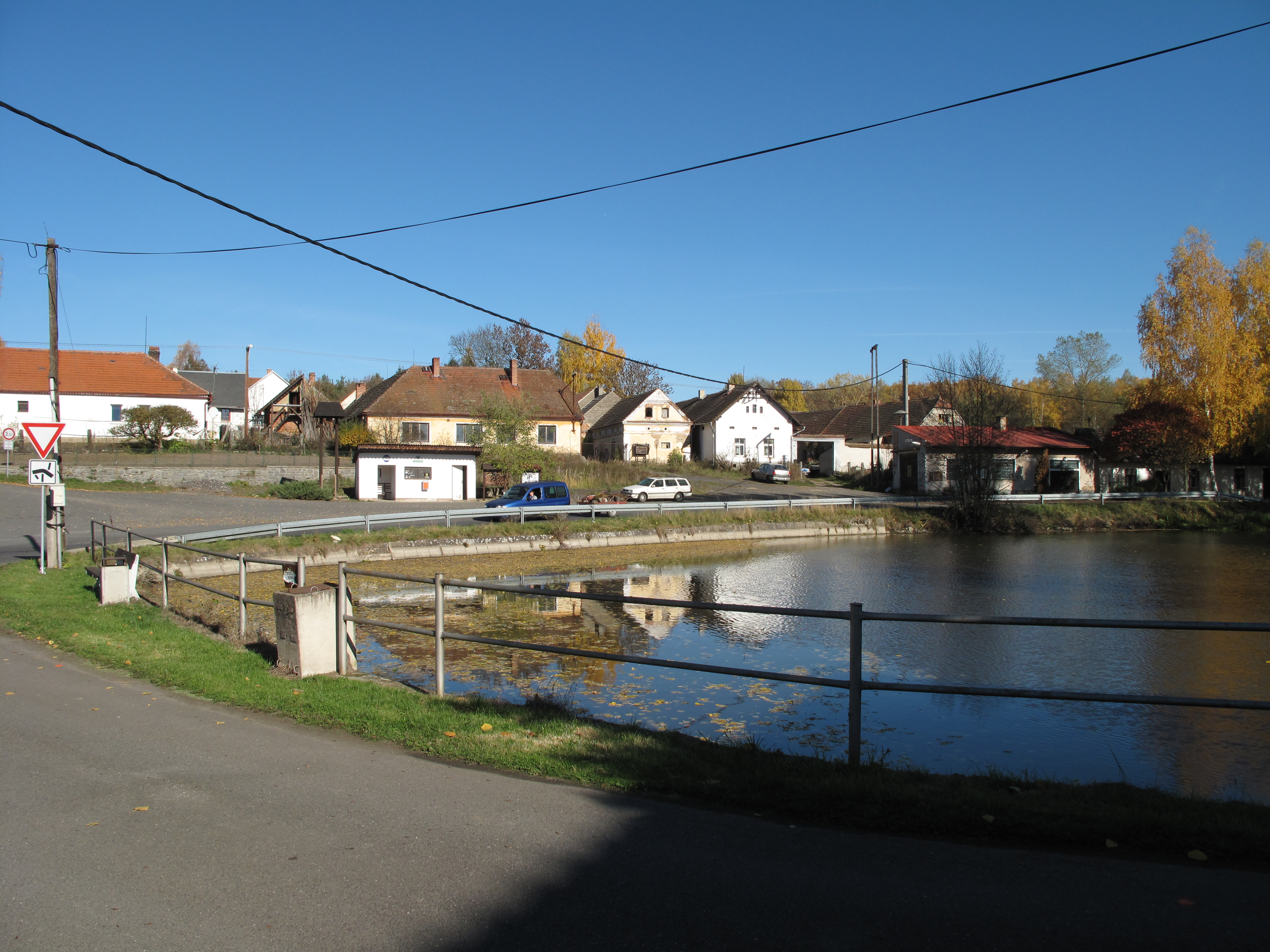 Rybník v Nestrašovicích. Okres Příbram, Česká republika.